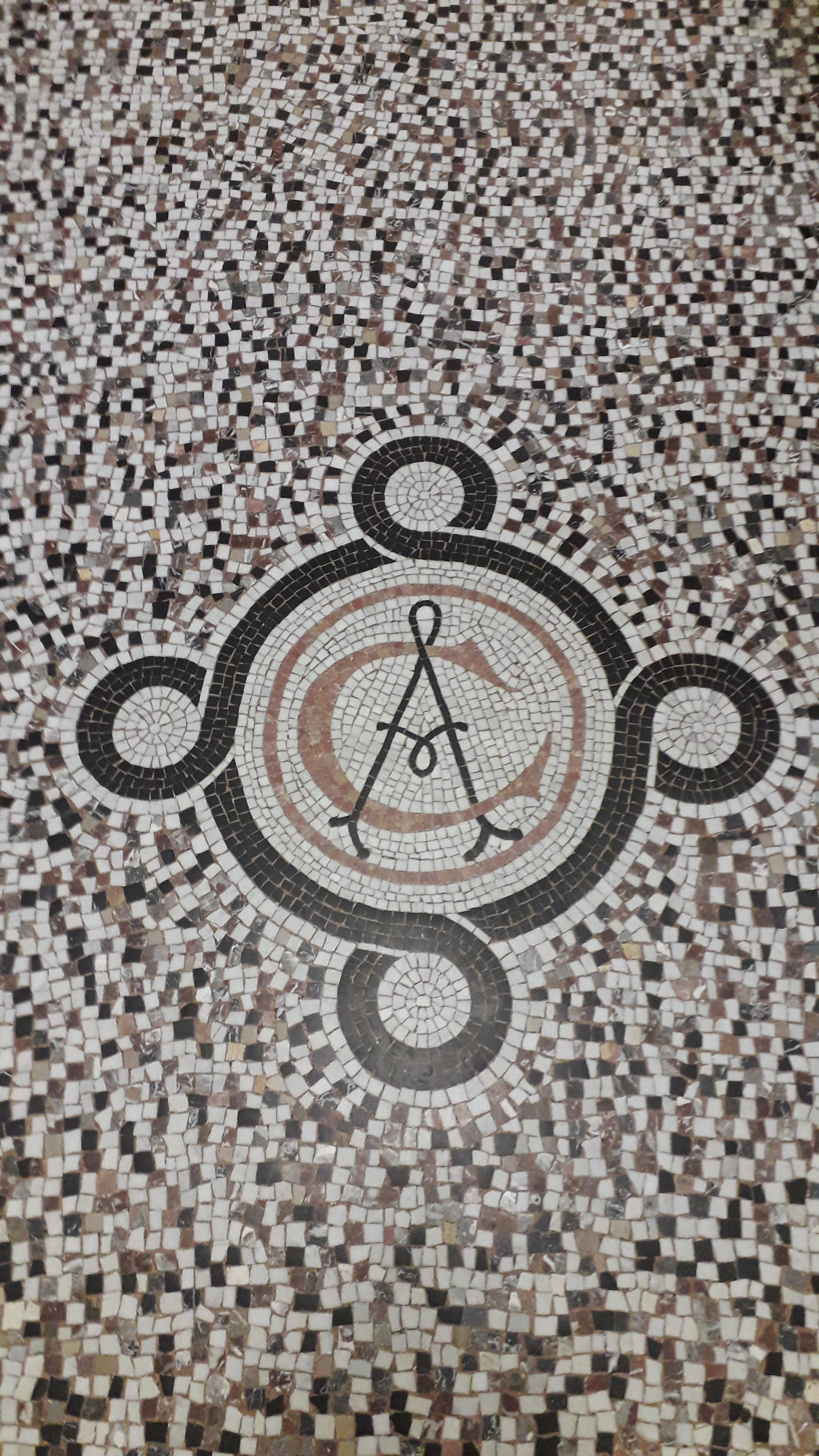 Monogramme d'Alfred Cherequefosse. Pavement de sol en mosaïque du rez-de-chaussée de l'Hôtel Cherequefosse, 23 rue du Chambge, Tournai.